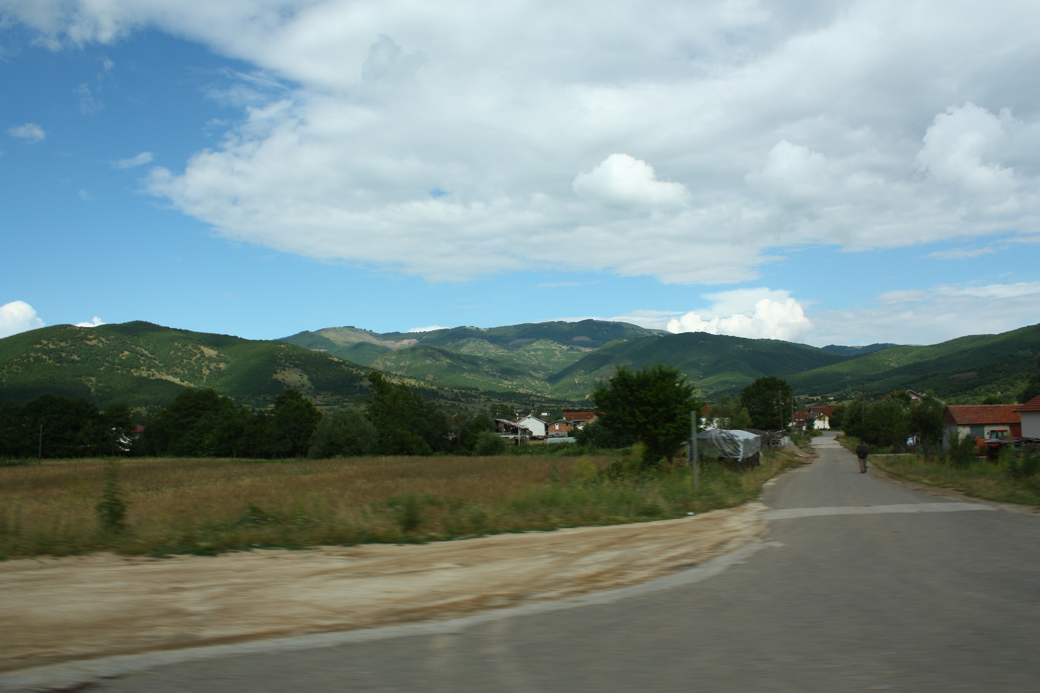 Kutretino, Macedonia